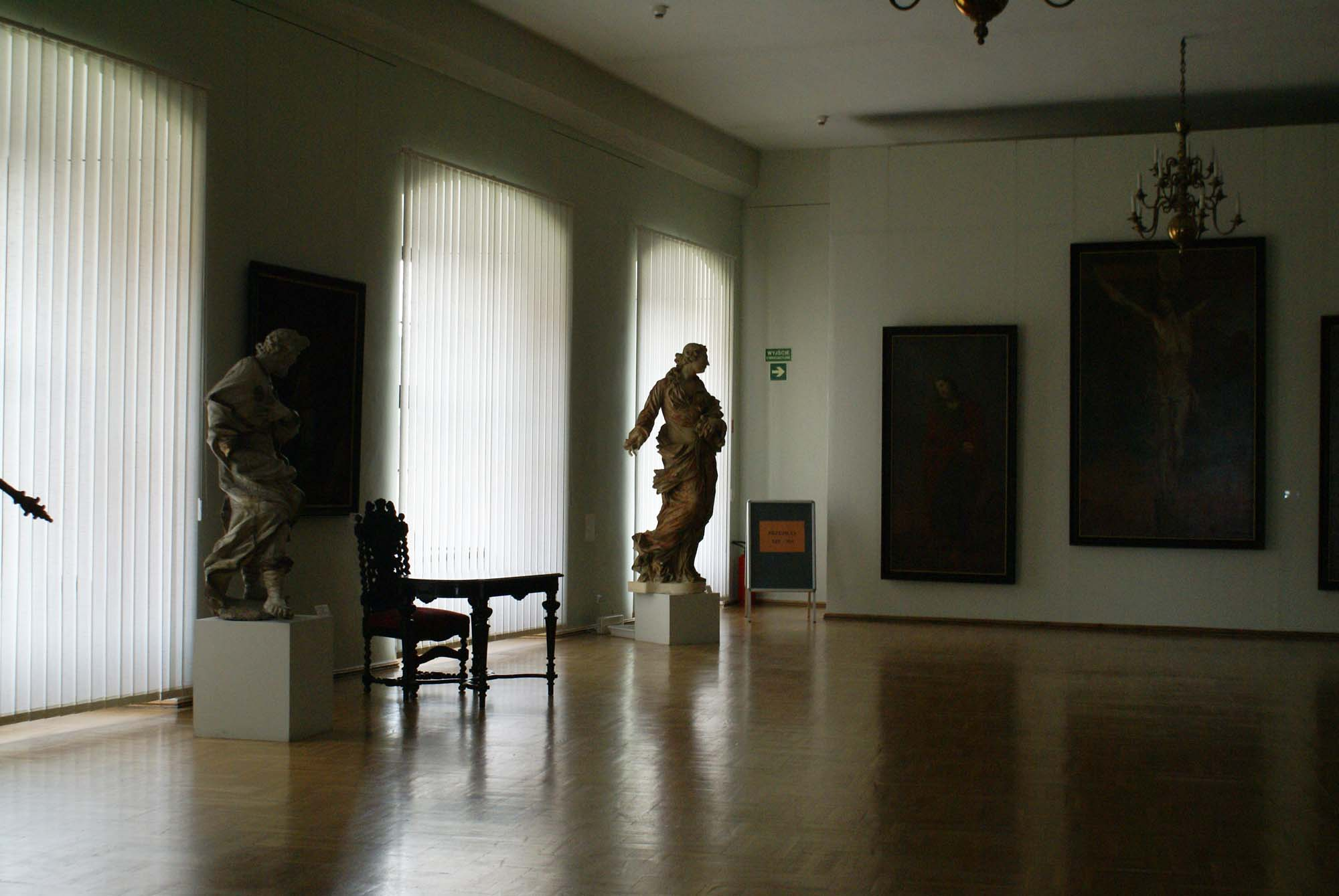 Brzeg, zamek, 1547-1586